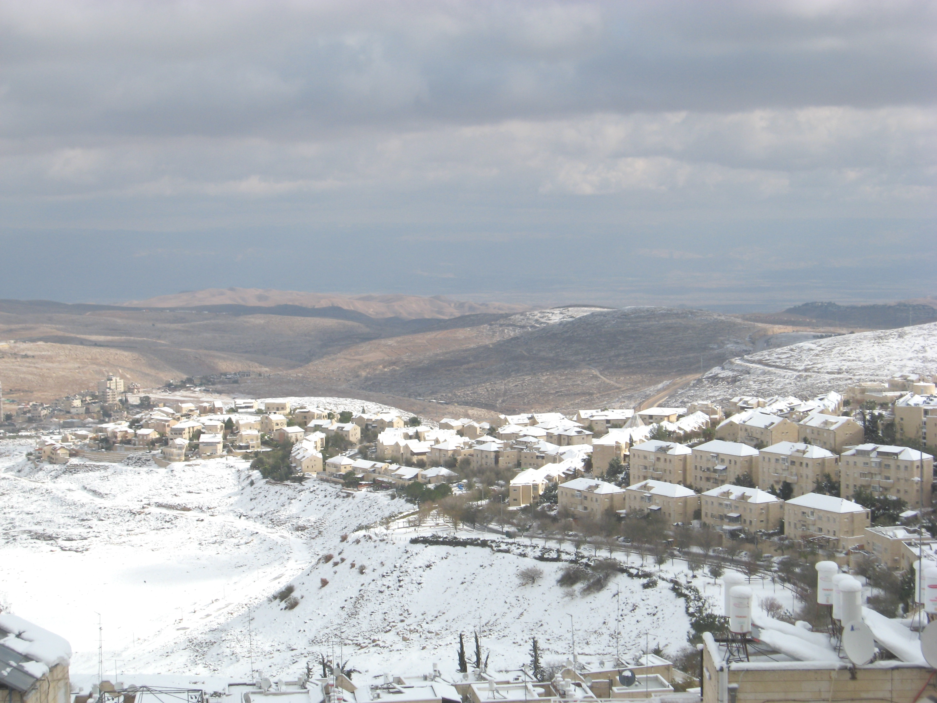 Снег в иерусалимском районе Писгат Зеев 13 декабря 2013 года.